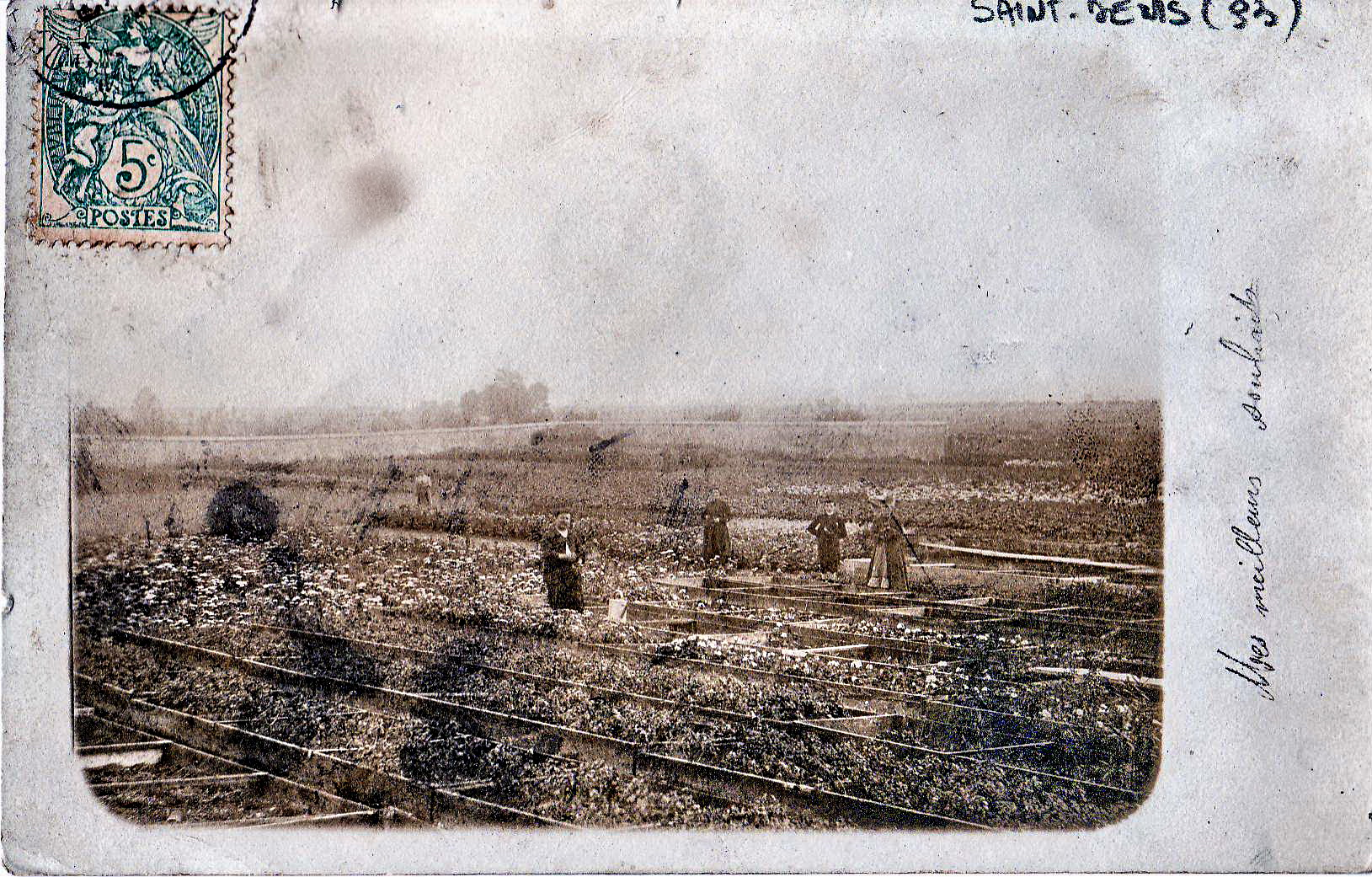 Carte photo ancienne des établissements A. Bernard, horticulteurs à Saint-Denis (Seine-Saint-Denis)